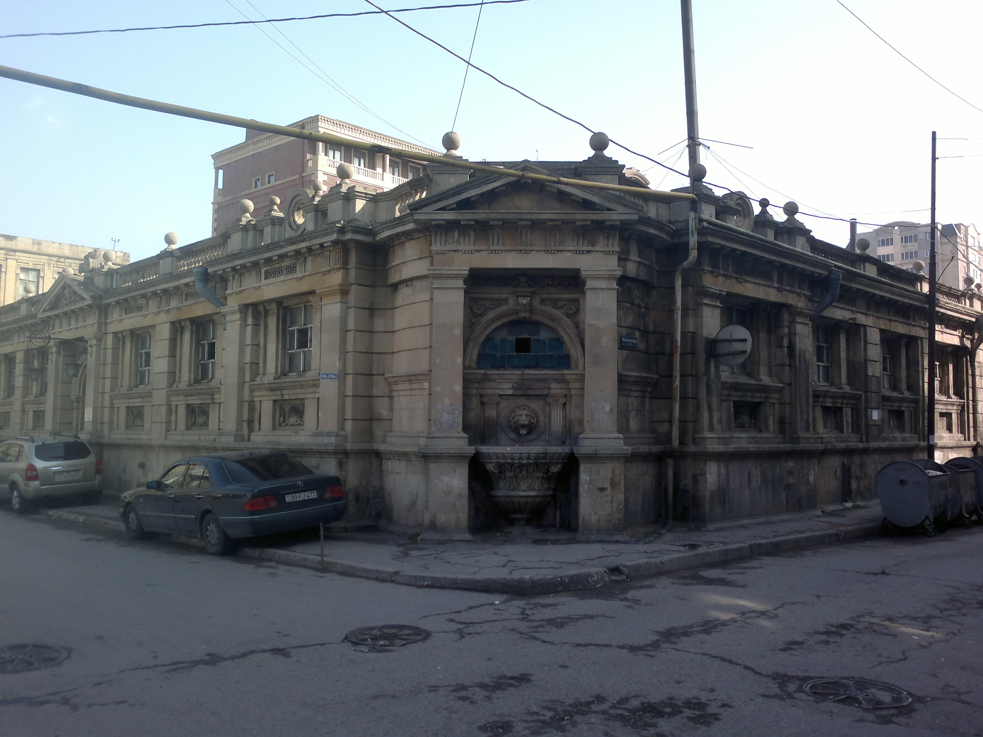 Fantasy bath